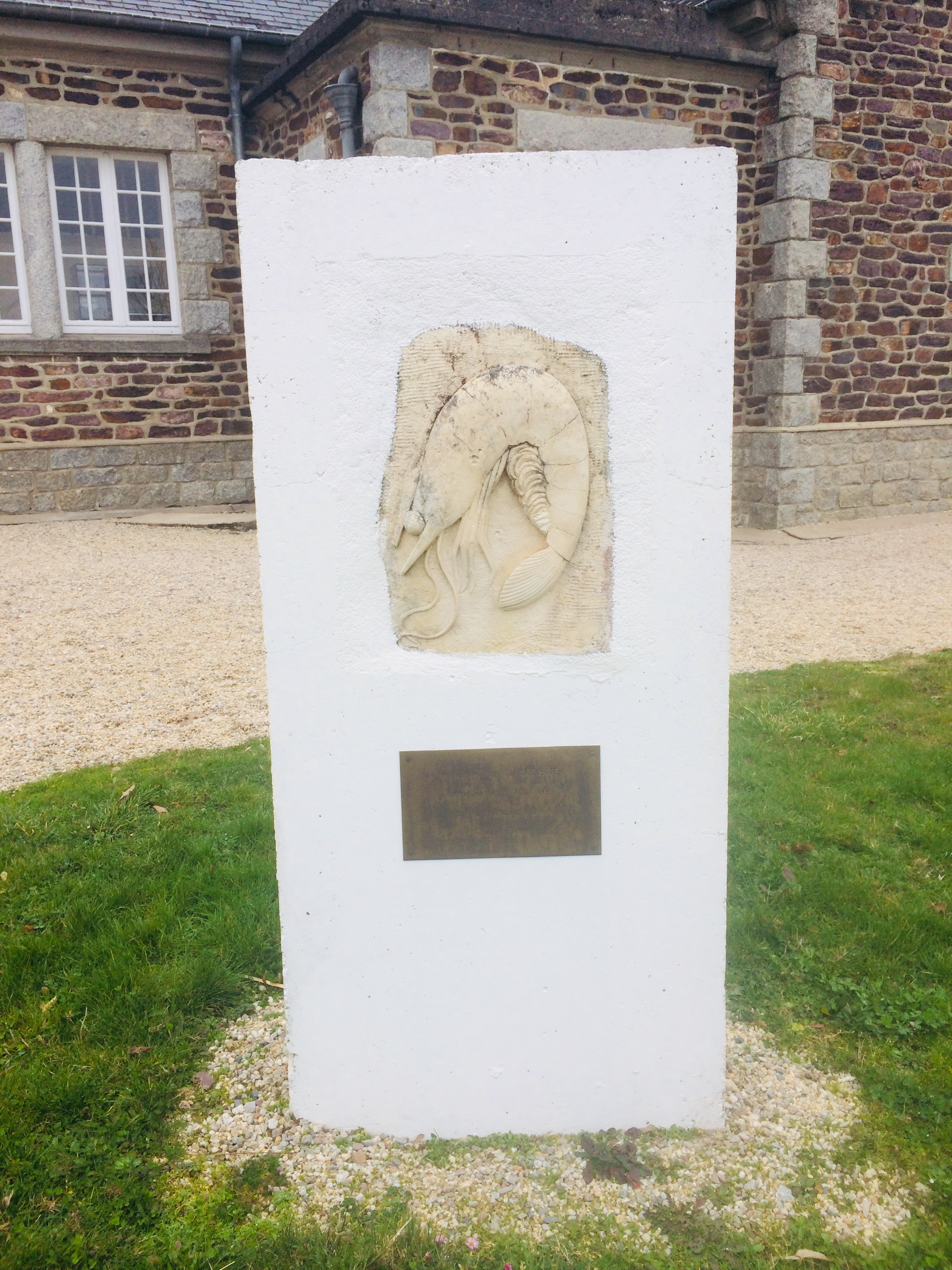 Monument dédié à "la Crevette", inauguré le 15 août 1991 par la promotion EOR Colonel Zahn devant le quartier général du 4° Bataillon de St-Cyr Coetquidan en l'état en 2019